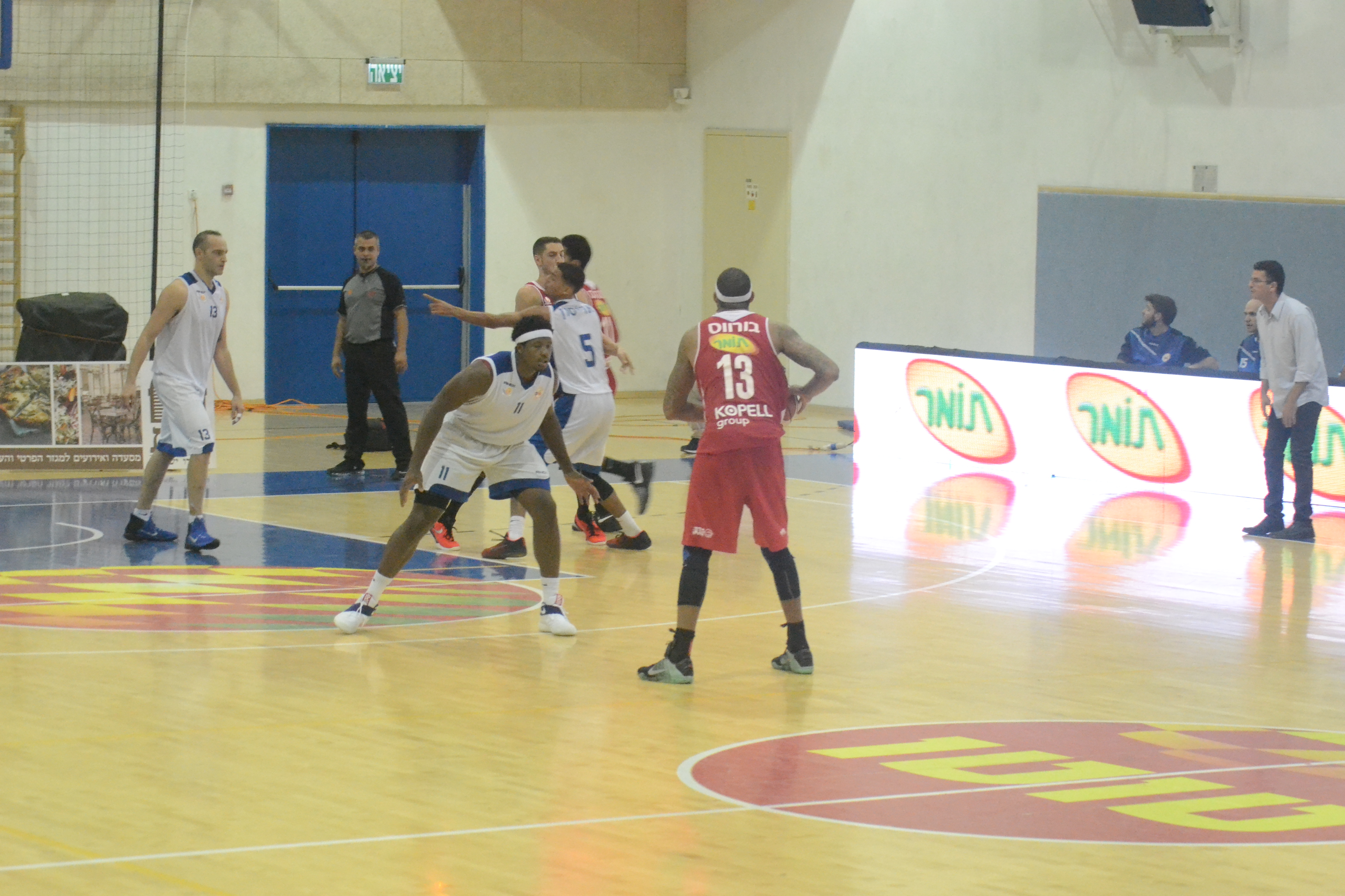 מכבי רחובות (בלבן) במשחק בית באולם קציר 2016